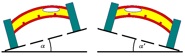 Libelle bei Messung einer Achsneigung in 2 Lagen (Neigung stark übertrieben)